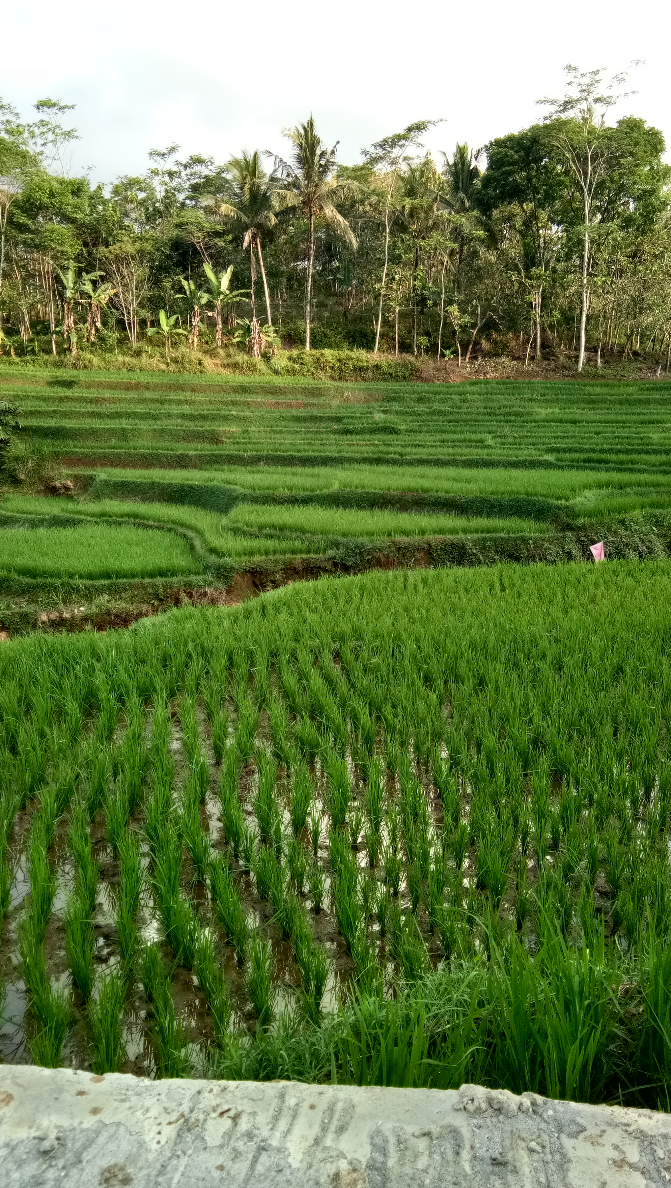 keelokan alam di sebuah desa. memanjakan mata siapapun yang melihatnya